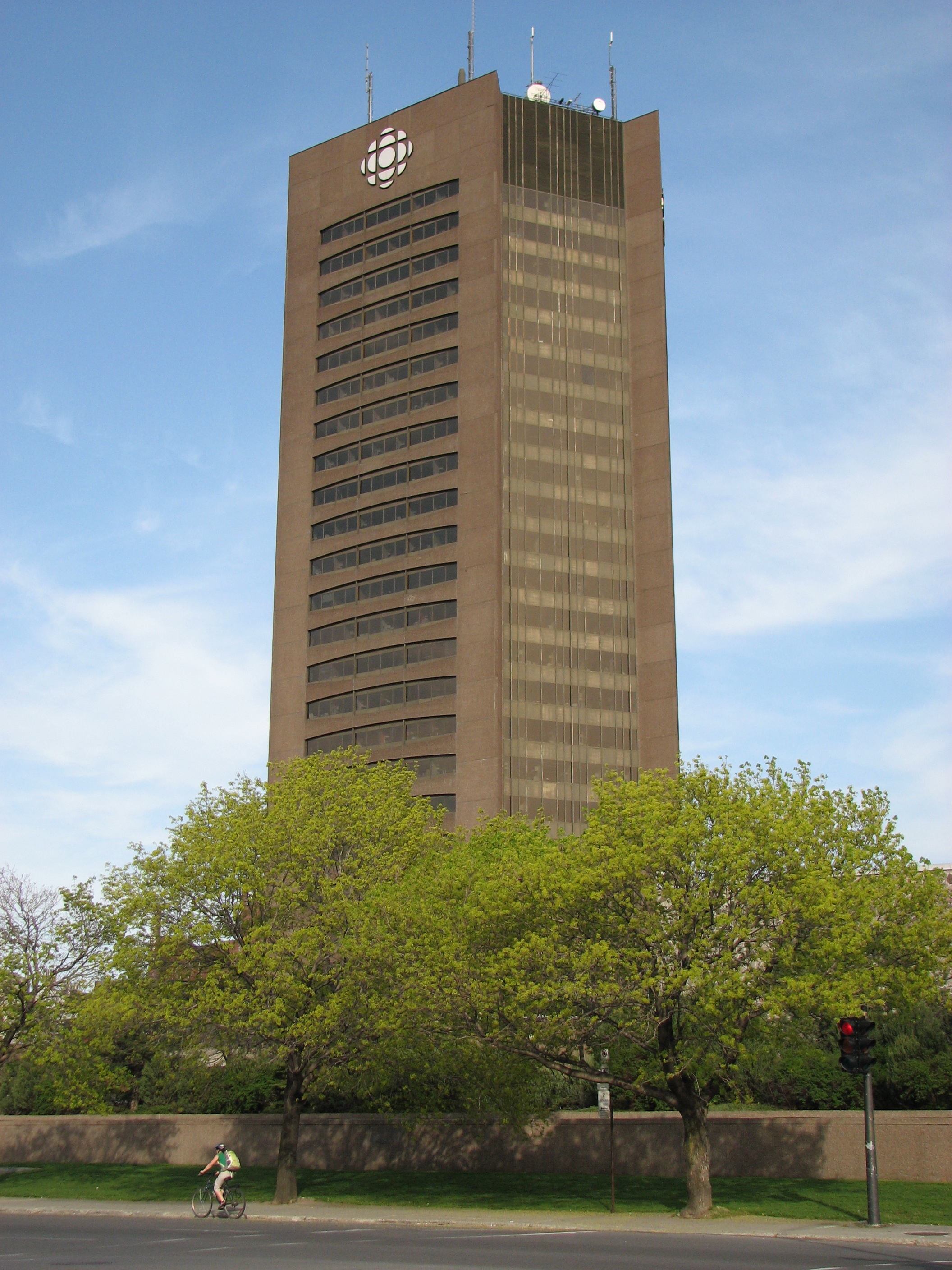 Tour de Radio-Canada sur le boulevard René-Lévesque à Montréal